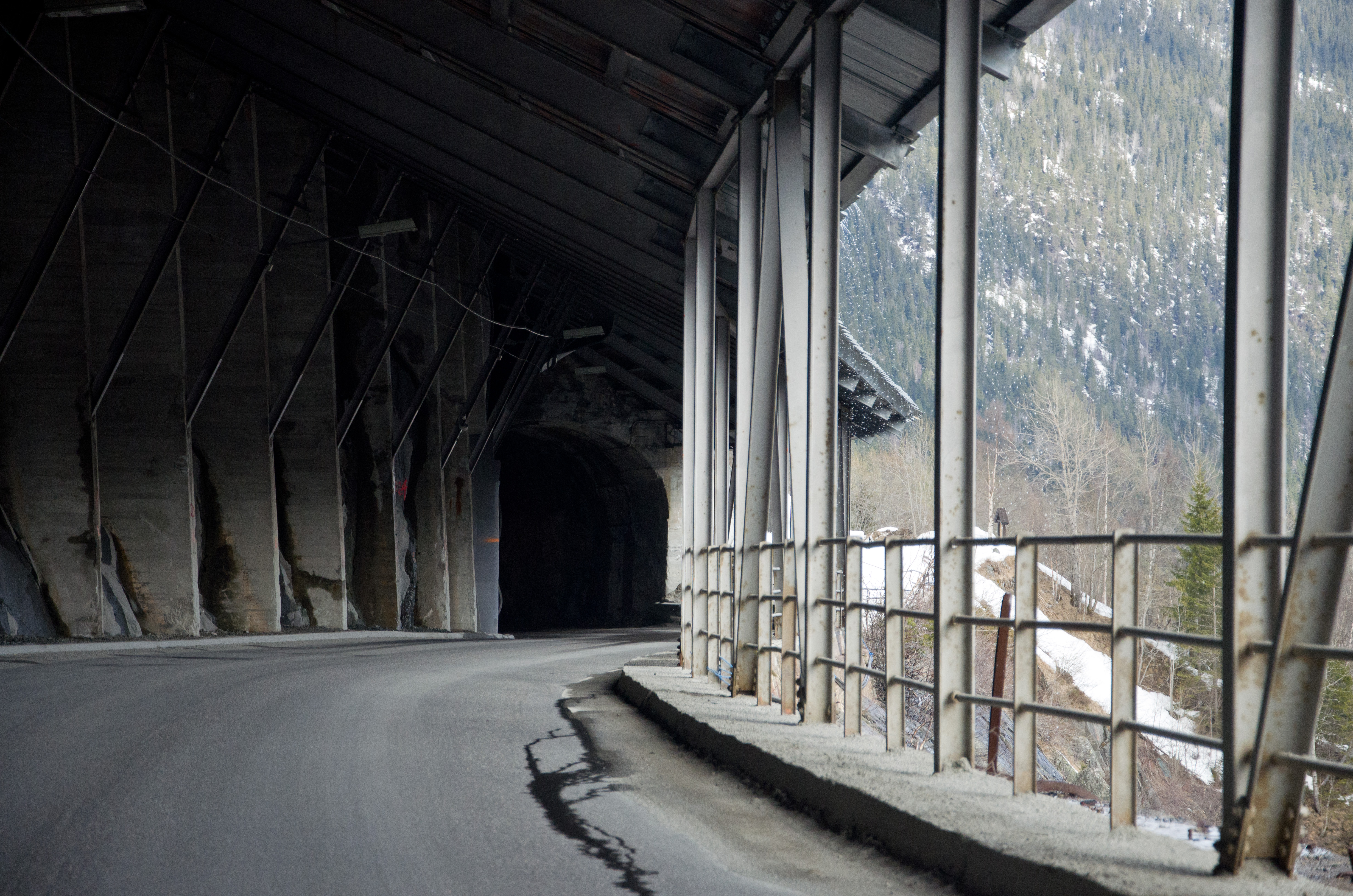 Maristigtunnelen på fylkesvei 37 i Tinn kommune